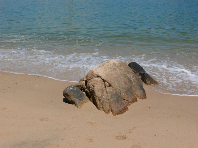 海美灣的自然海灘。中間的大石時給浪花覆蓋。